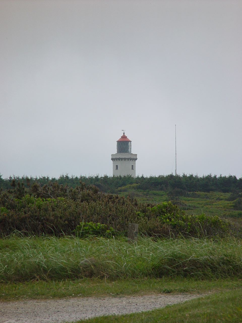 Hanstholm Fyr i Hanstholm.